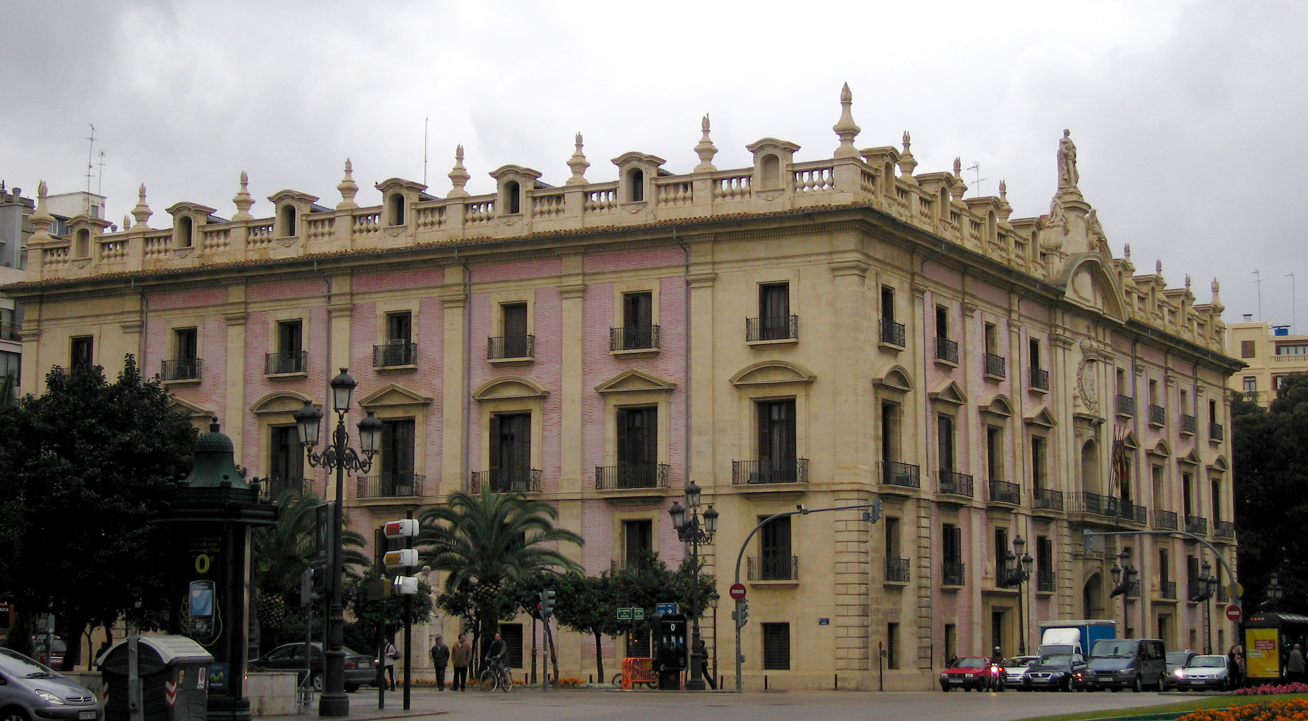 Audiència de València